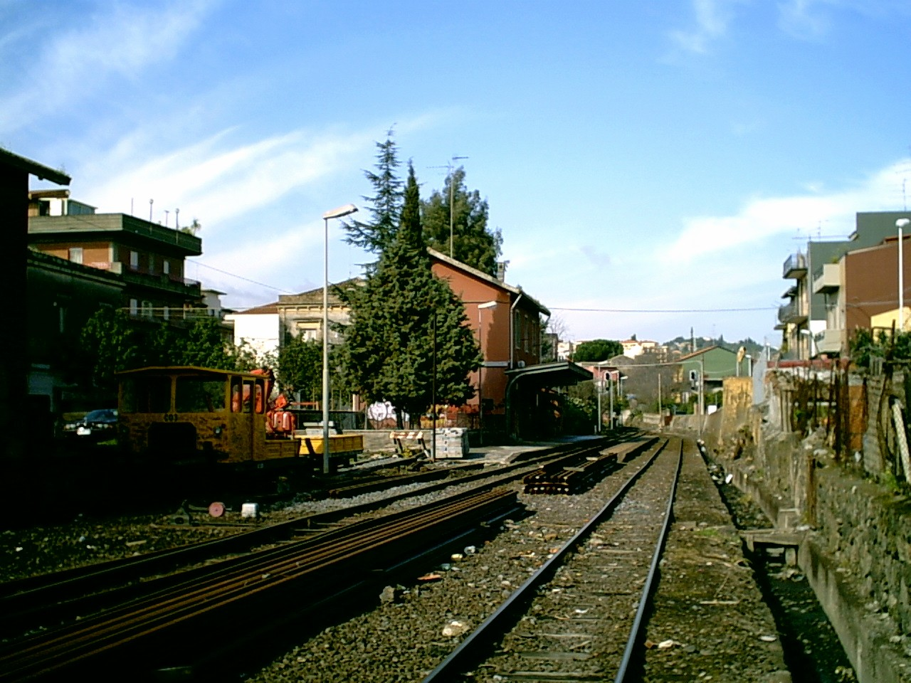 Foto della Stazione di Misterbianco